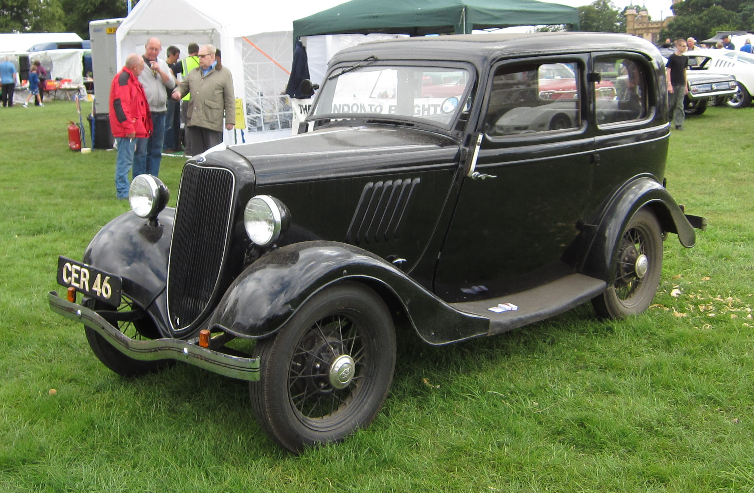 Ford 6CV selon les criteres pour les impots francaises mais Ford 8 hp selon les anglaises